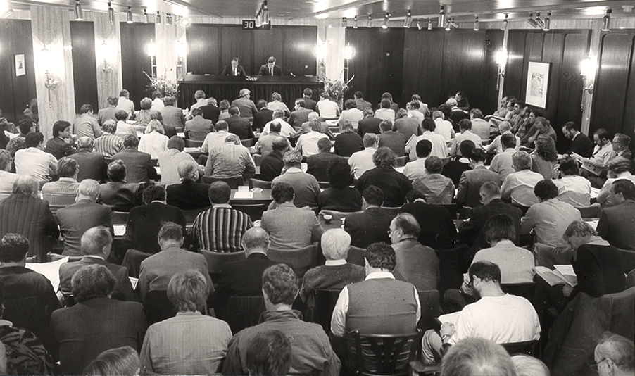 Erste Rapp-Auktion im neuen Geschäftshaus in Wil, 1985